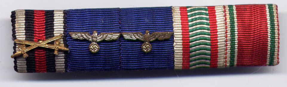 Bandschnalle eines Offiziers im 2. Weltkrieg (von links nach rechts) Ehrenkreuz des Weltkrieges 1914/1918, in drei Klassen, hier: für Frontkämpfer – mit Schwertern Wehrmacht Dienstauszeichnung 4 Jahre Wehrmacht Dienstauszeichnung 12 Jahre Ungarische Weltkriegs-Erinnerungsmedaille 1914-18 Bulgarische Weltkriegs-Erinnerungsmedaille 1915-18